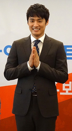 오상진 아나운서 타이셀렉트 홍보대사 위촉식